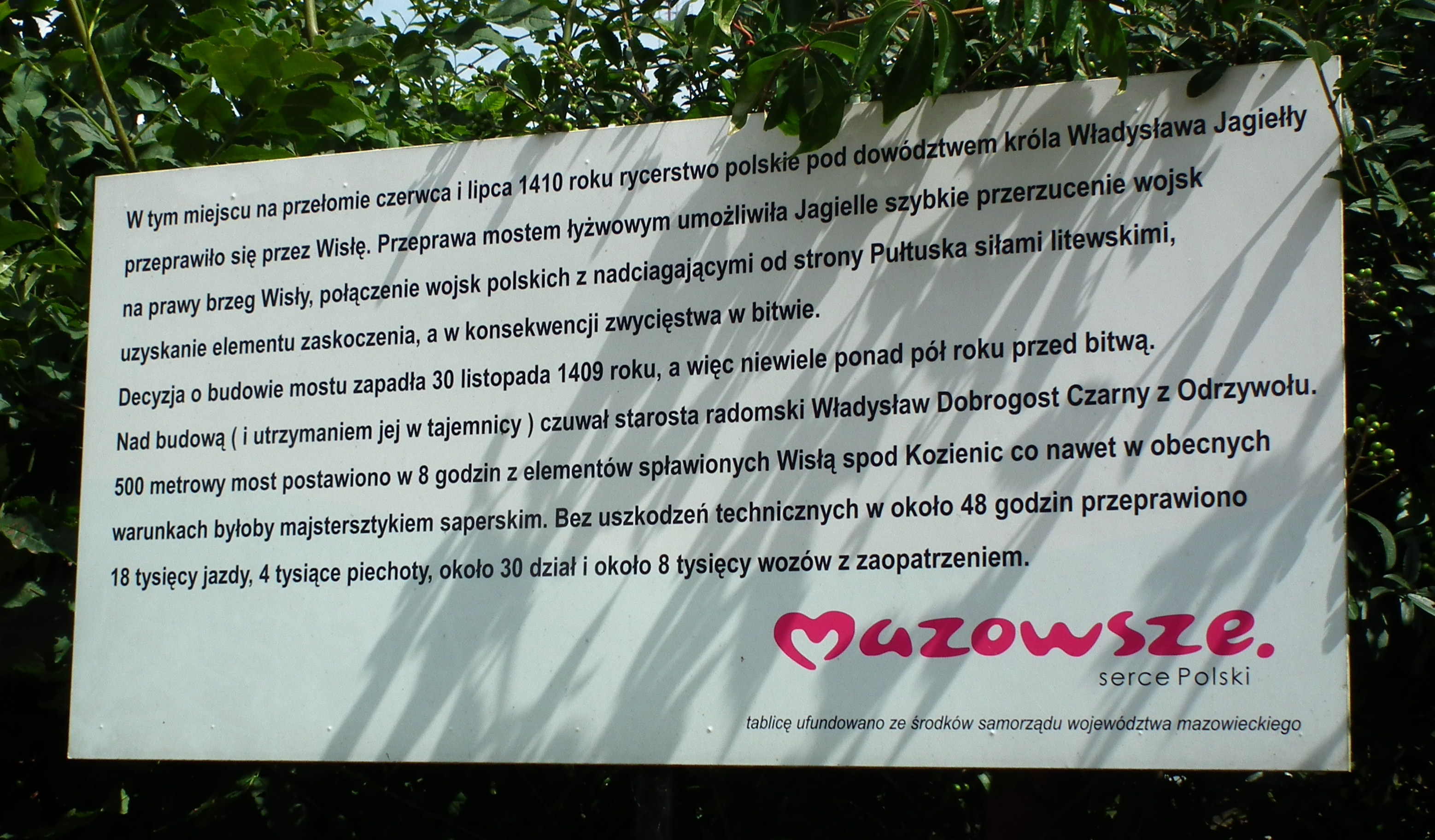 Czerwińsk Nad Wisłą - miejsce po moście łyżwowym z 1410r.